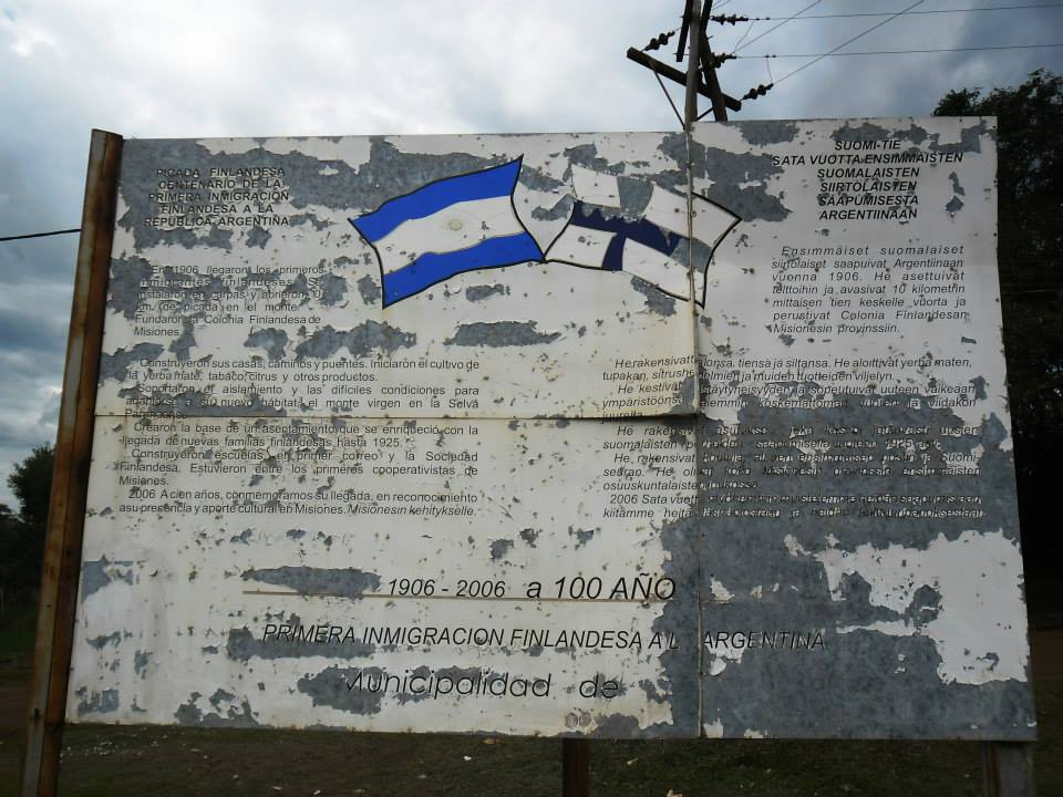 Cartel conmemorativo de la inmigración finlandesa en Misiones y la fundación de la Colonia Finlandesa. A la izquierda, escrito en español, se puede leer: Picada Finlandesa: Centenario de la Inmigración finlandesa a la República Argentina. En 1906 llegaron los primeros inmigrantes finlandeses. Se instalaron en carpas y abrieron 10 km de picada en el monte. Fundaron la Colonia Finlandesa de Misiones. Construyeron sus casas, caminos y puentes. Iniciaron el cultivo de la yerba mate, tabaco, citrus y otros productos. Soportaron el aislamiento y las difíciles condiciones para adaptarse a su nuevo hábitat: el monte virgen de la Selva Paranaense. Crearon la base de un asentamiento que se enriqueció con la llegada de nuevas familias finlandesas hasta 1925. Construyeron escuelas, el primer correo y la Sociedad Finlandesa. Estuvieron entre los primeros cooperativistas de Misiones. 2006: A cien años, conmemoramos su llegada en reconocimiento a su presencia y aporte cultural en Misiones. Misionesin kehitykselle.